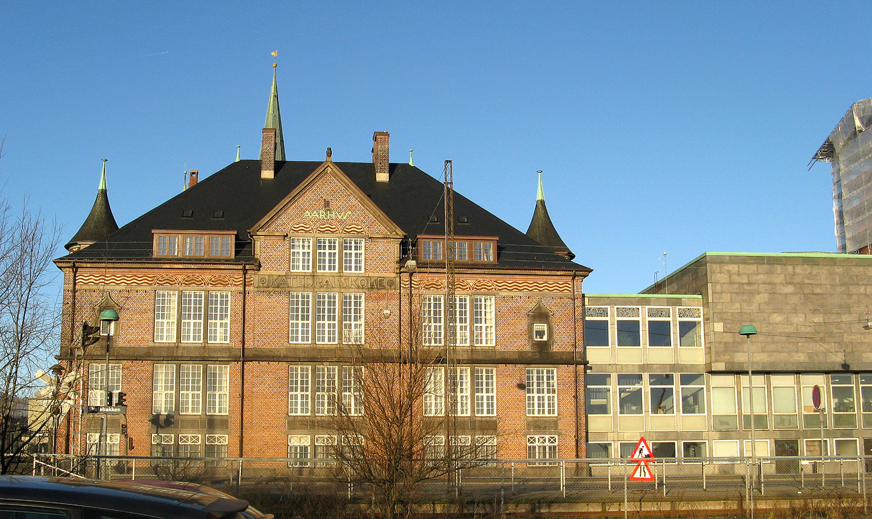 Aarhus Katedralskole er et århusiansk gymnasium. Den røde bygning, fra 1906, er tegnet af Hack Kampmann, og den nye bygning til højre, fra 1957, er tegnet af C.F. Møller